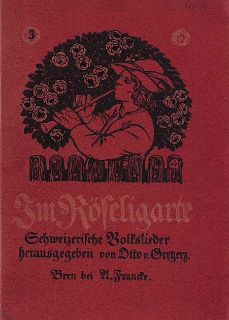 Im Röseligarte, Heft mit schweizerischen Volkslieder, herausgegeben von Otto von Greyerz, Bern 1910, mit Illustrationen von Rudolf Münger